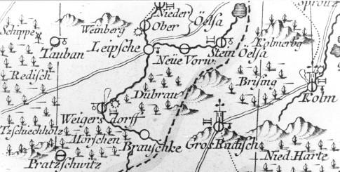 Ausschnitt aus Schenks Oberlausitzkarte für den Artikel Dauban in der deutschsprachigen Wikipedia.